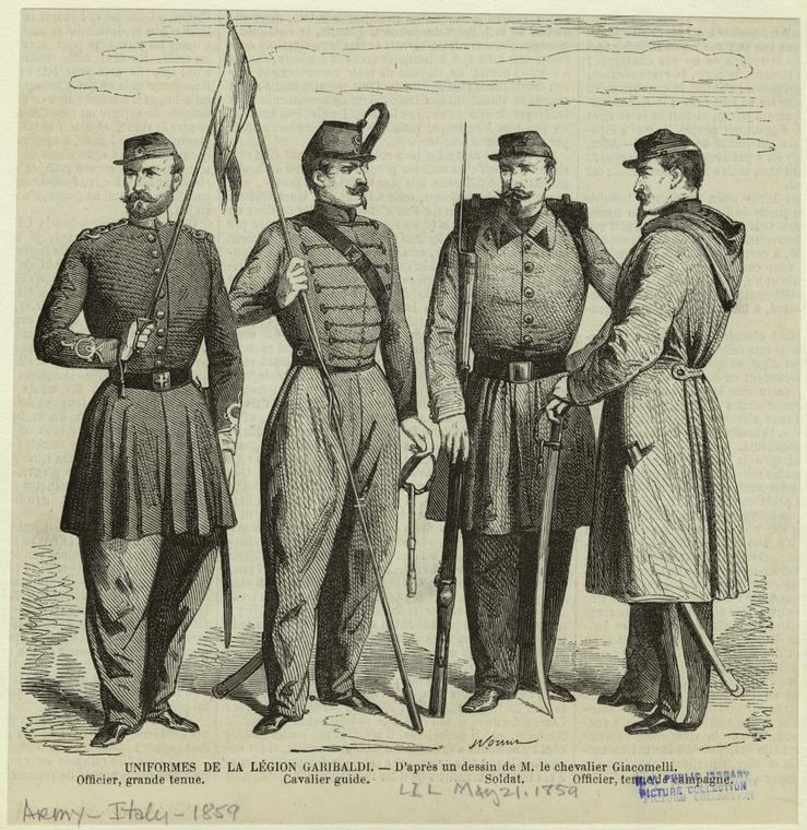 Uniformes de la légion Garibaldi. Printed on border: "Officier, grande tenue ; Cavalier guide ; Soldat ; Officier, tenue de campagne." Written on border: "May 21, 1859."